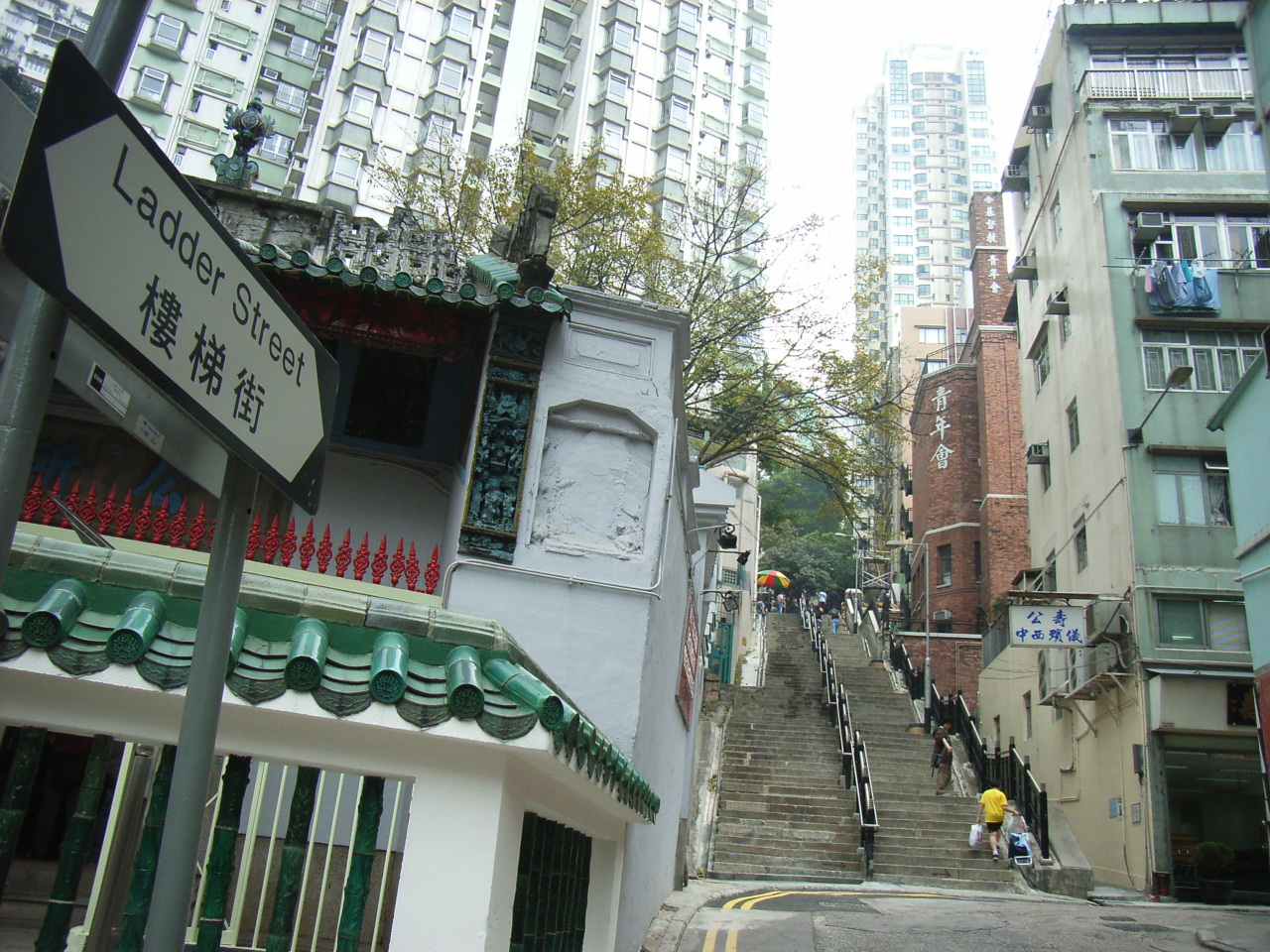 樓梯街位於zh:香港zh:香港島zh:上環zh:嚤囉街zh:荷李活道附近zh:文武廟之西面 Sheung Wan, Hong Kong